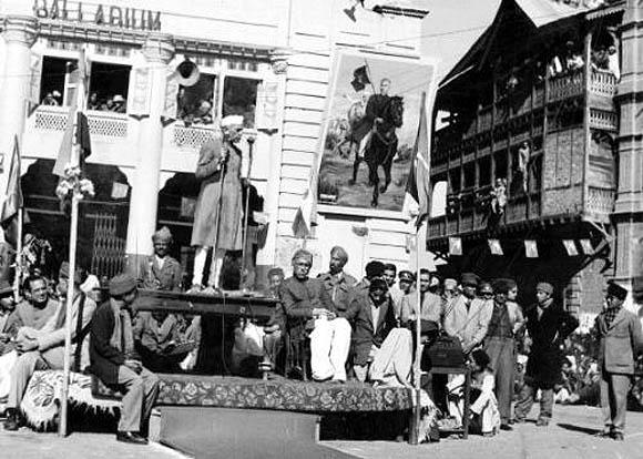 Jawaharlal Nehru and Sheikh Abdullah in Srinagar during Nehru's visit to Kashmir in 1947